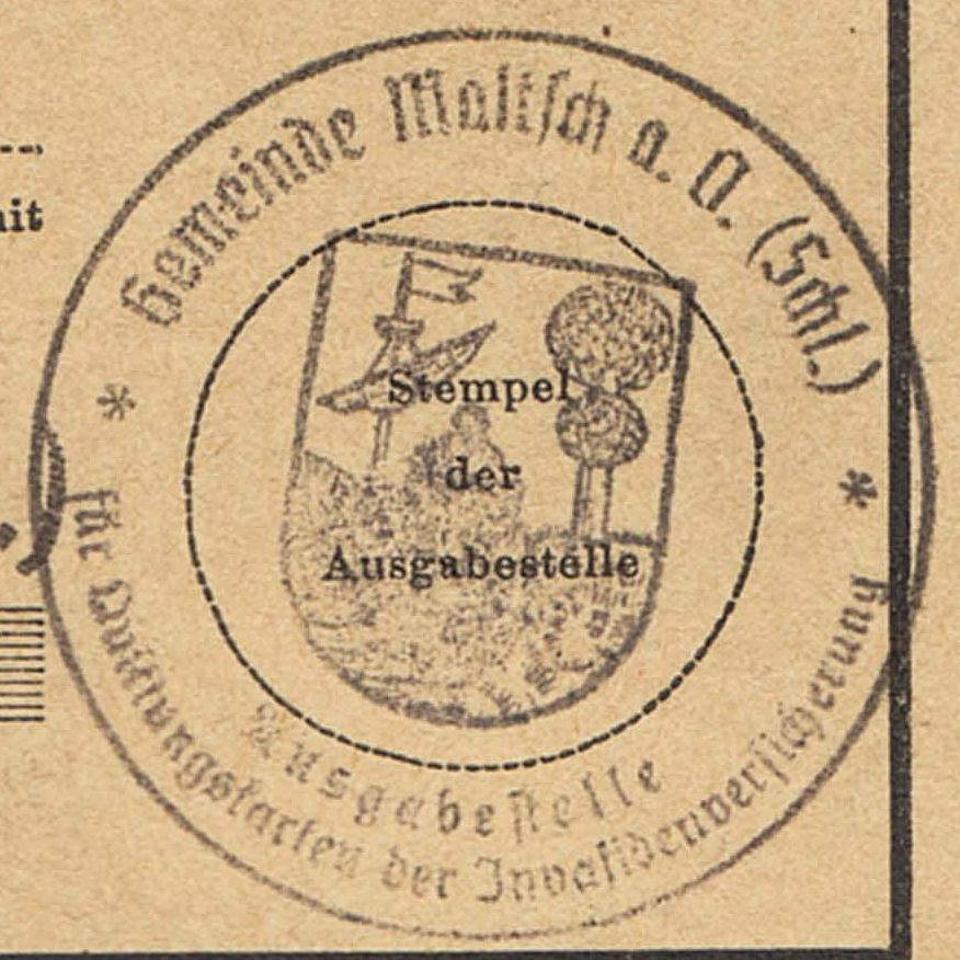 Reprodukcja odcisku pieczętnego Malczyc z 1944 roku